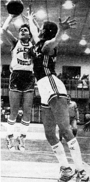 Zawodniczka Ślęzy Wrocław Krystyna Zagórska (po lewej) podczas ataku na kosz